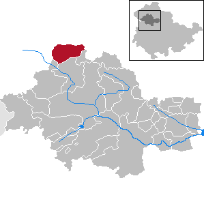 Dünwald in Thuringia - Unstrut-Hainich-Kreis